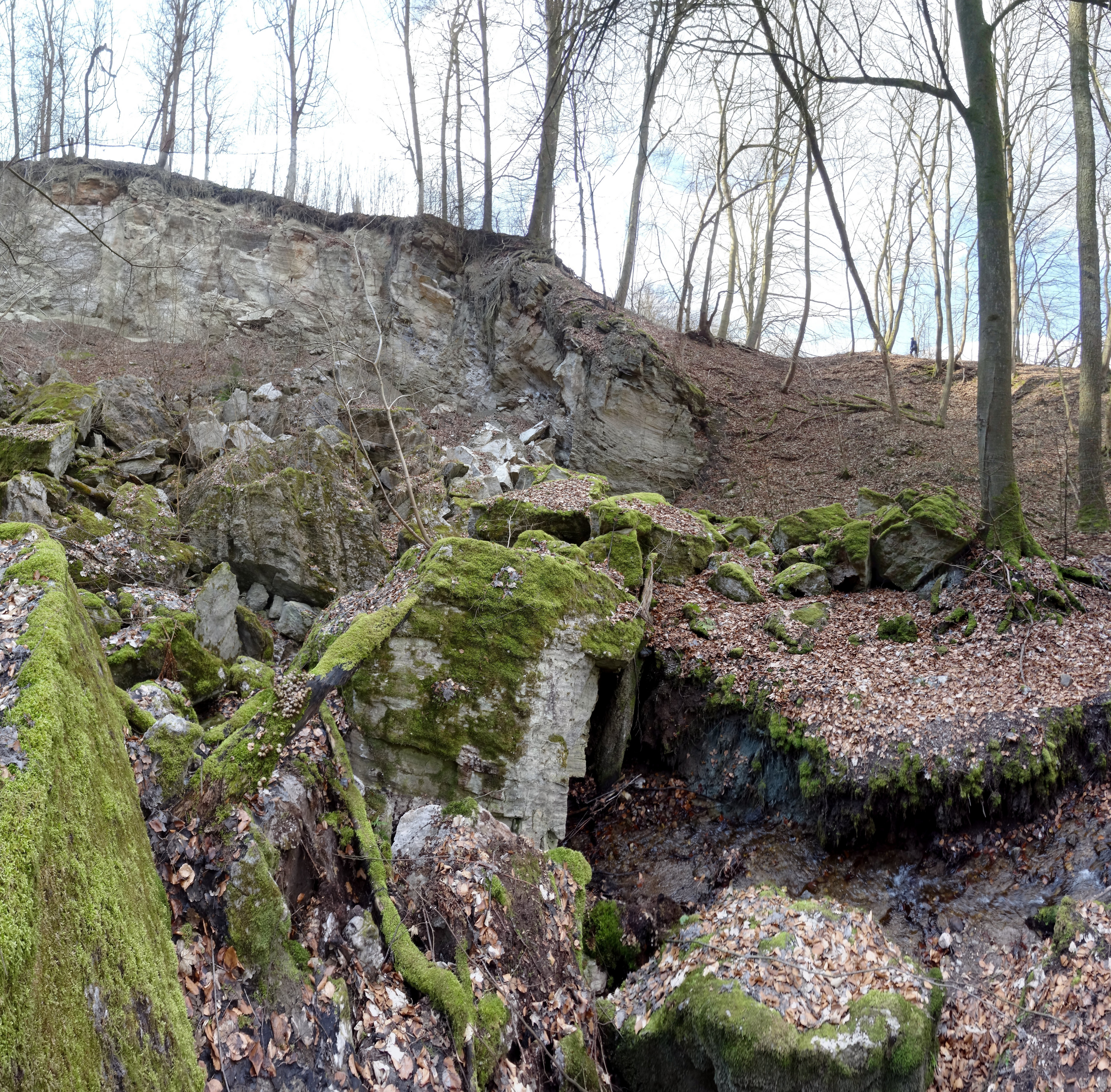 der Dinsterbach taucht ab ins Gipskarst Höhlensystem